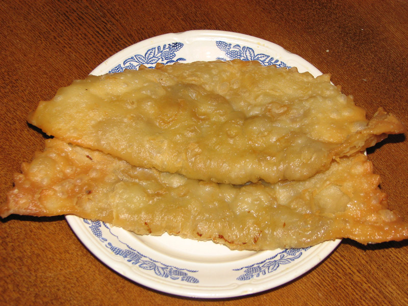 Чебурек